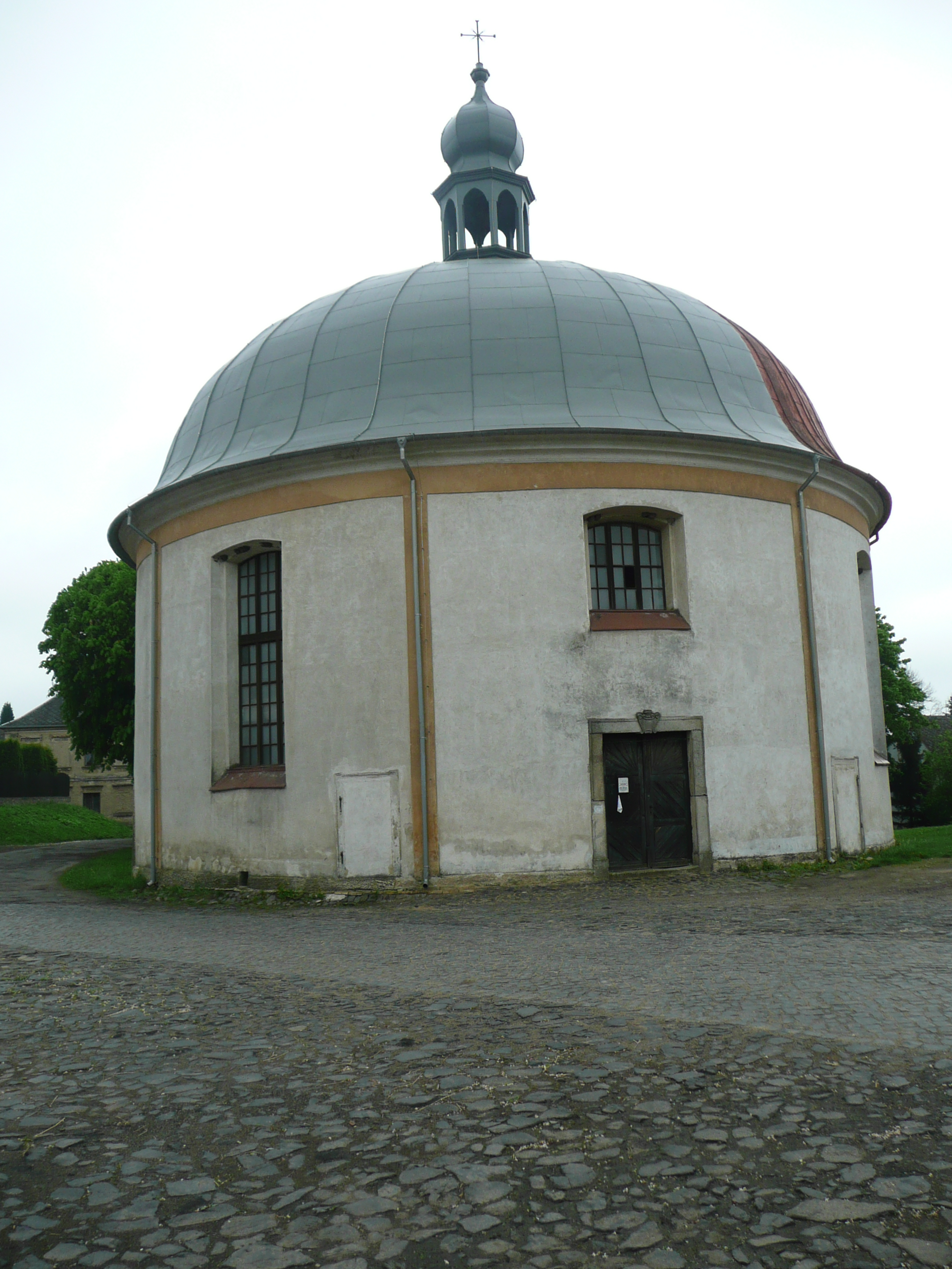 Kirche in Levin, Bauzustand 2013